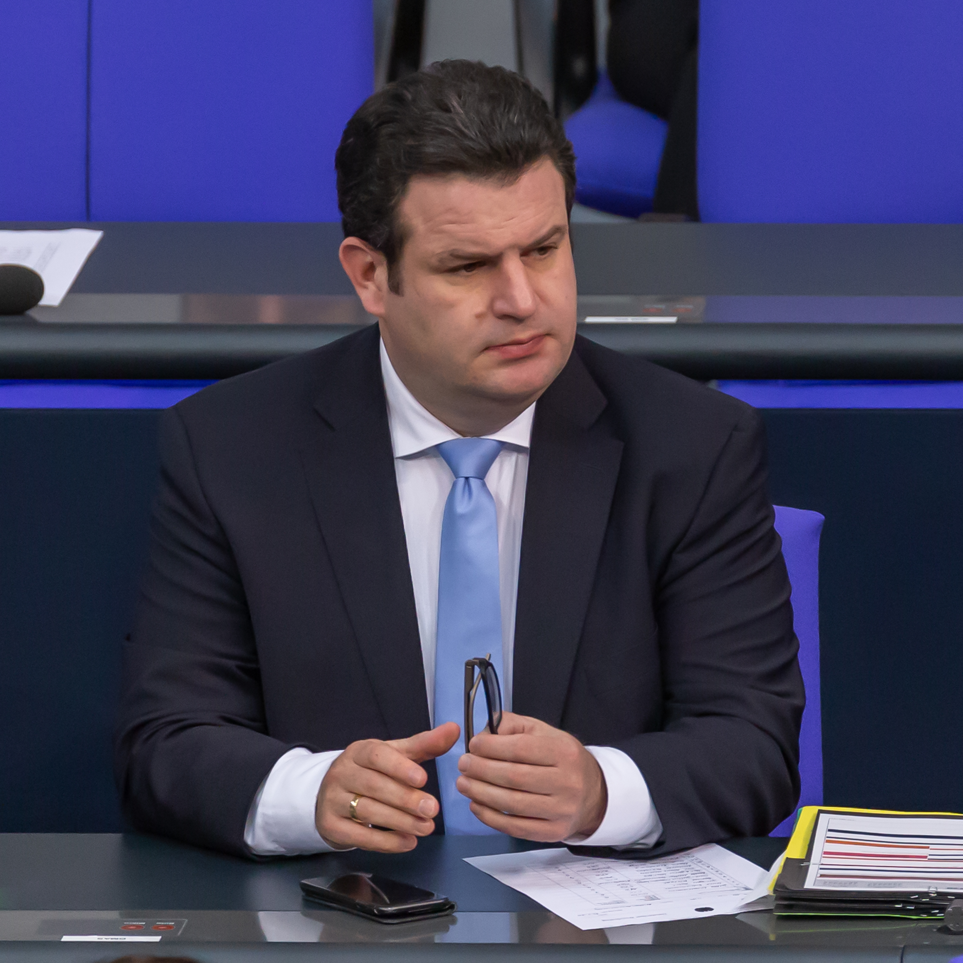 Deutscher Bundestag; Hubertus Heil, SPD, Bundesminister für Arbeit und Soziales, auf der Regierungsbank